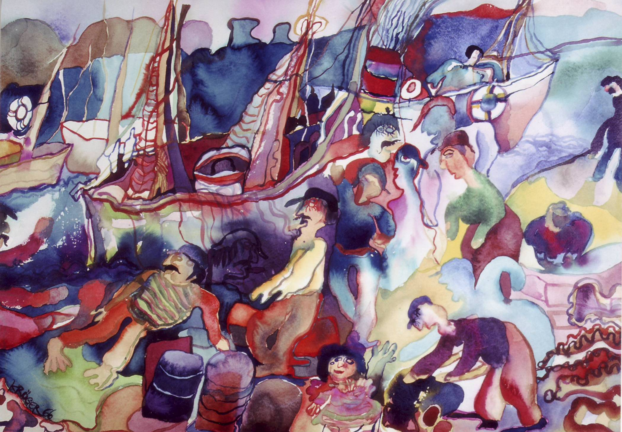 Pierre Kröger, Cyclades port, 1966, watercolor, 49x71cm (private collection)